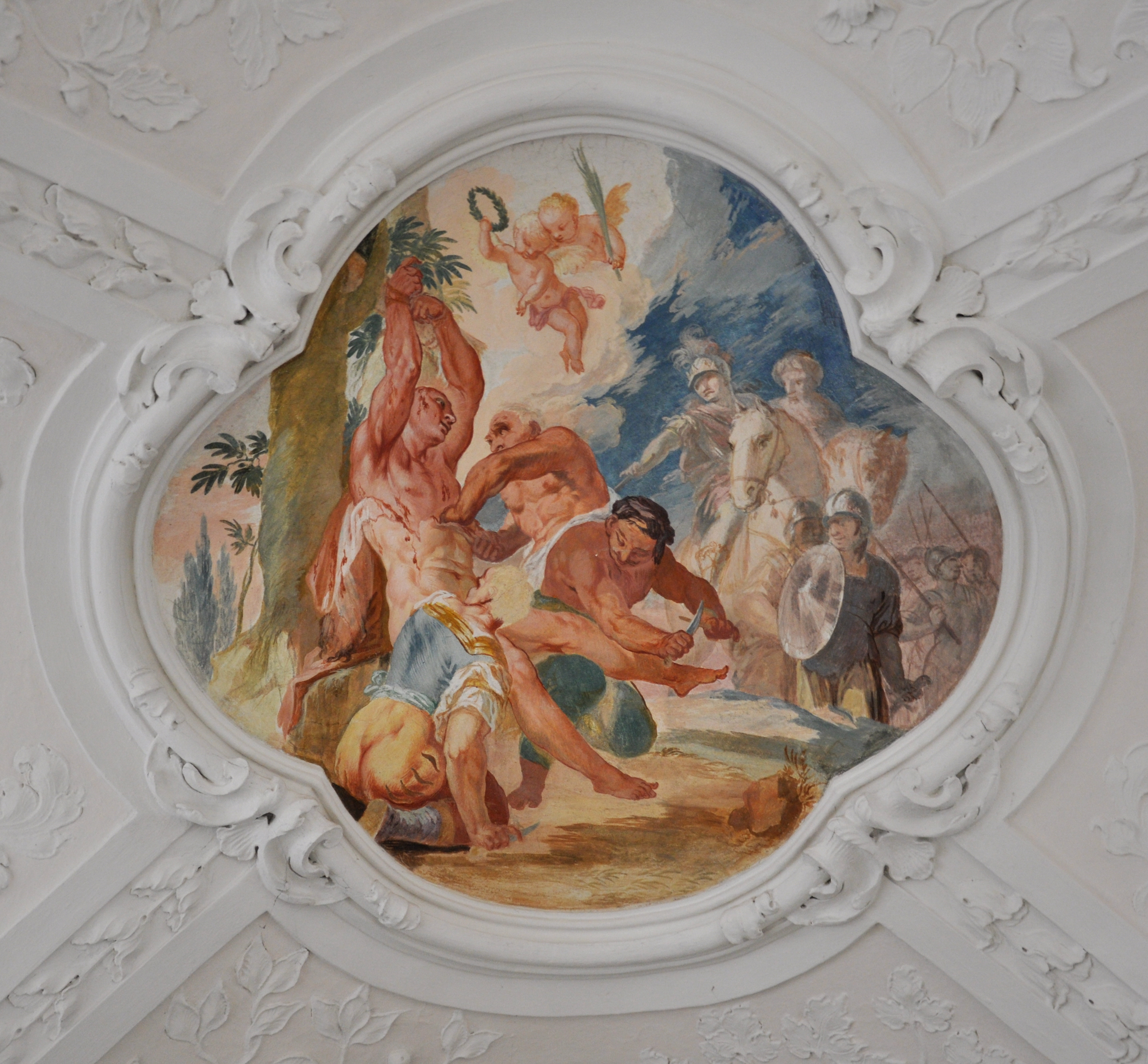 Buxheim, Kartause, Kartausenkirche St. Maria, Fresko am Lettnergewölbe, Martyrium des hl. Bartholomäus